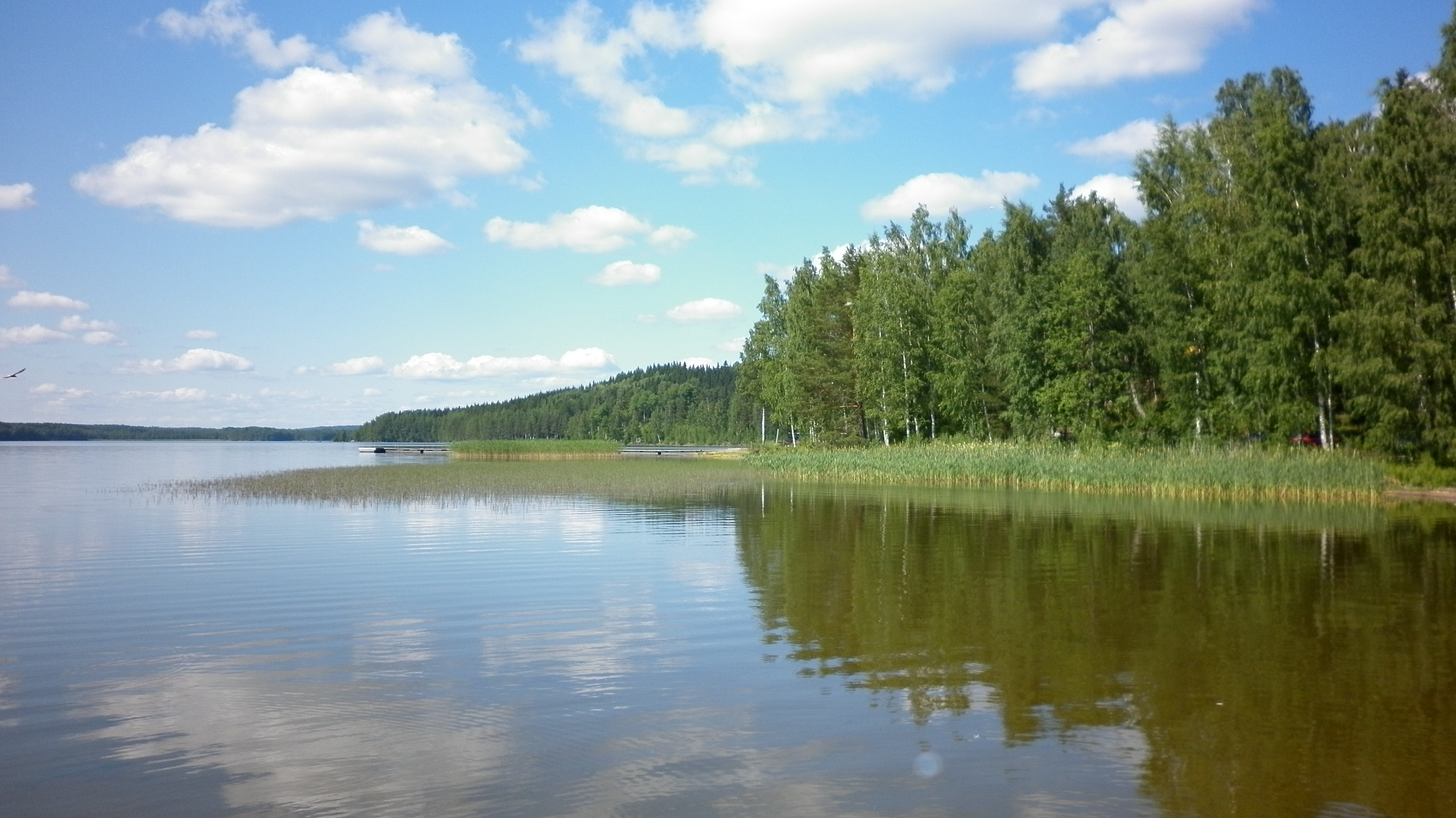 Ormajärven kaislikkoa untulanrannasta